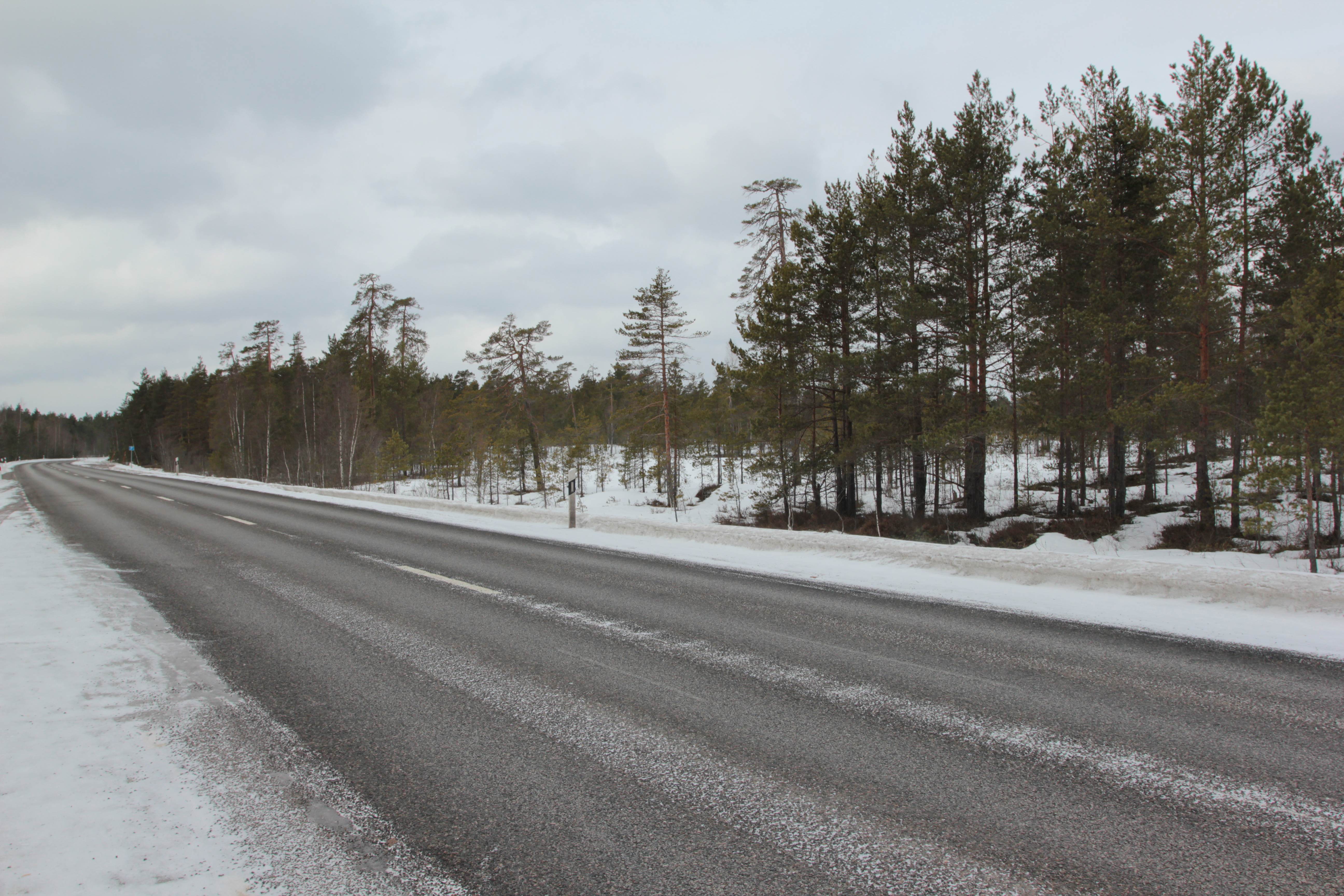 Länsväg 233 och naturreservatet Lappland, Skinnskattebergs kommun, Sverige.